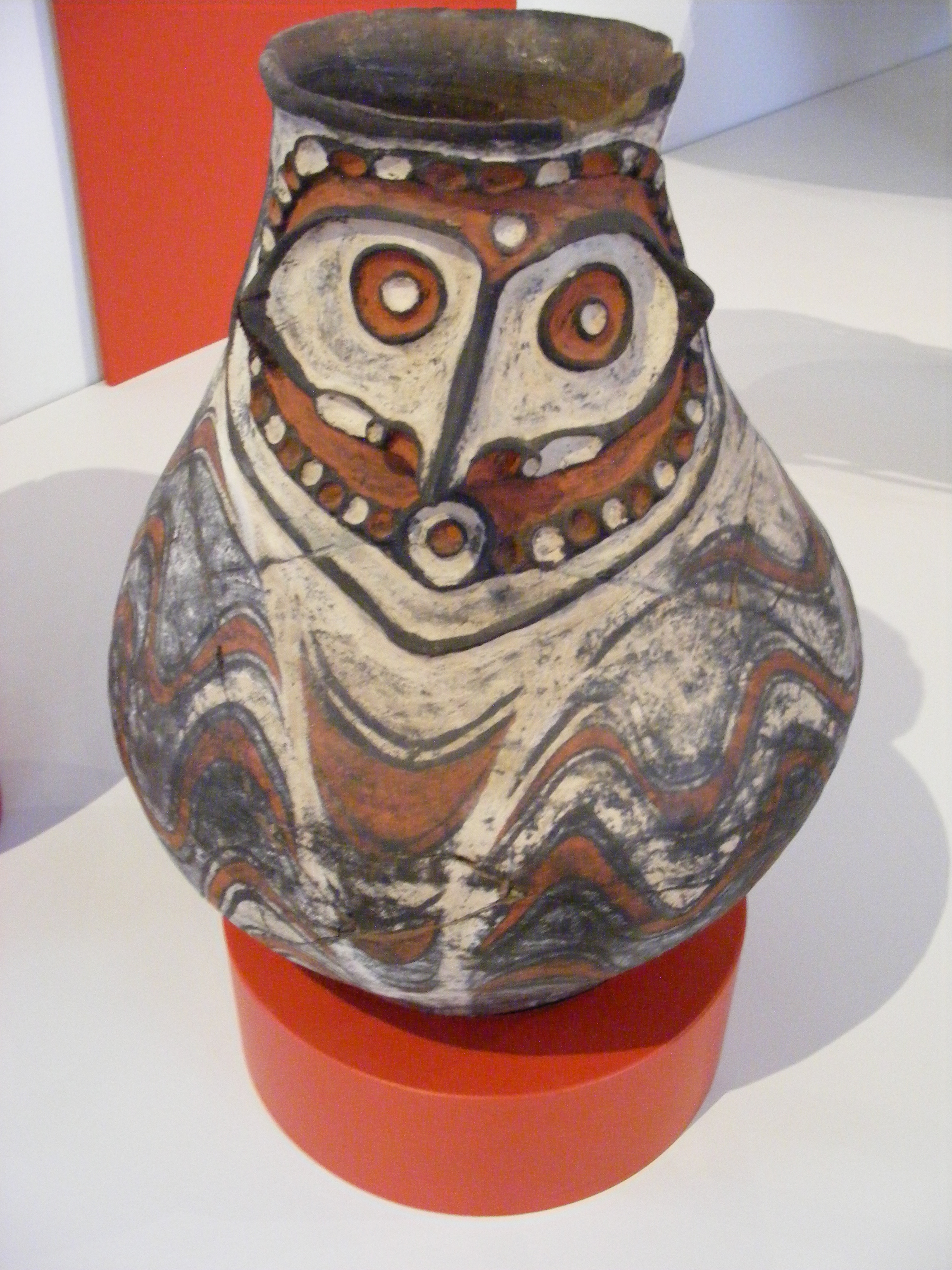 Keramischer Kochtopf “Lany” resp. “Seno” mit Gesichtsdarstellung, für Sago-Pudding aus dem Dorf Tsenap, hergestellt in Aiborn, Neuguinea, hergestellt vor 1912 (Exponat im Staatlichen Museum für Völkerkunde München)